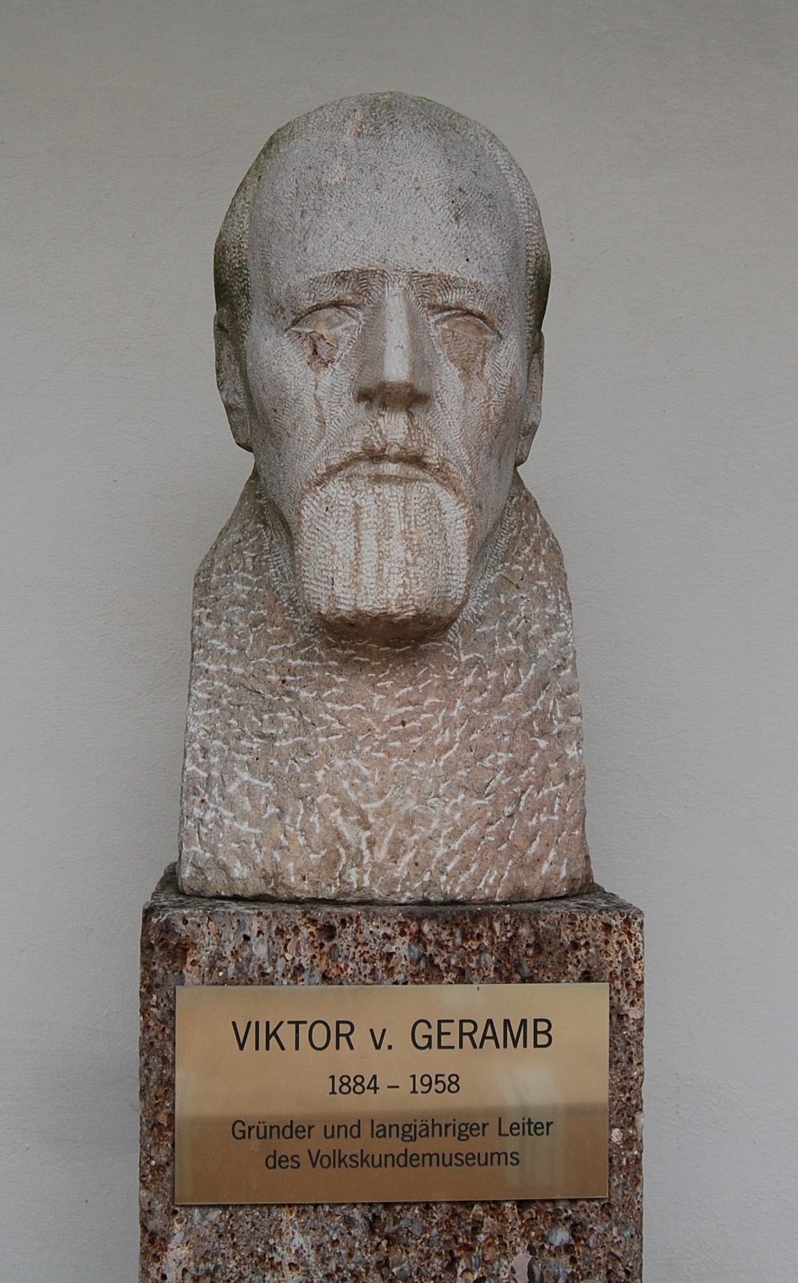 Portrait Viktor Gerambs im Innenhof des Volkskundemuseums in Graz